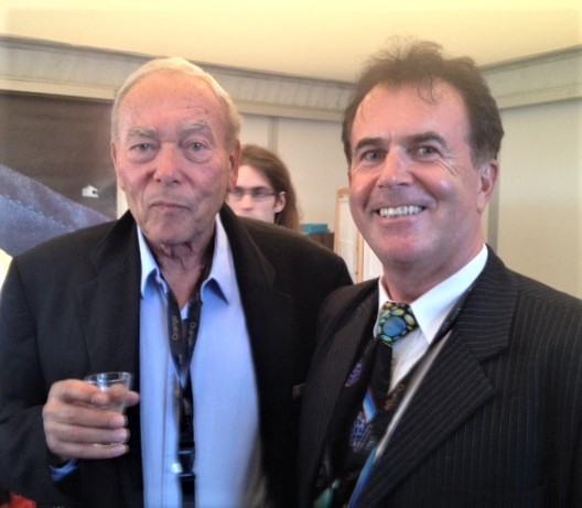 Roger Steinmann avec metteur en scene francaise Yves Boisset, au film festival de Cannes 2015